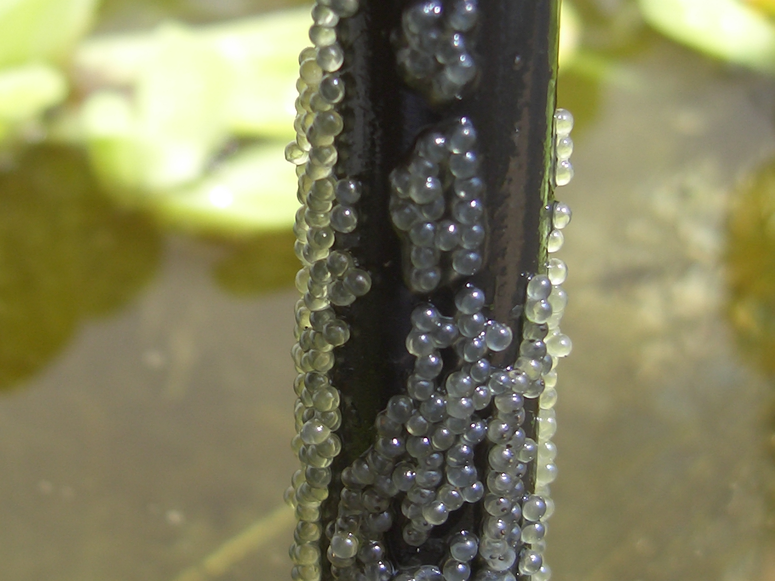 Eibänder des Moderlieschens